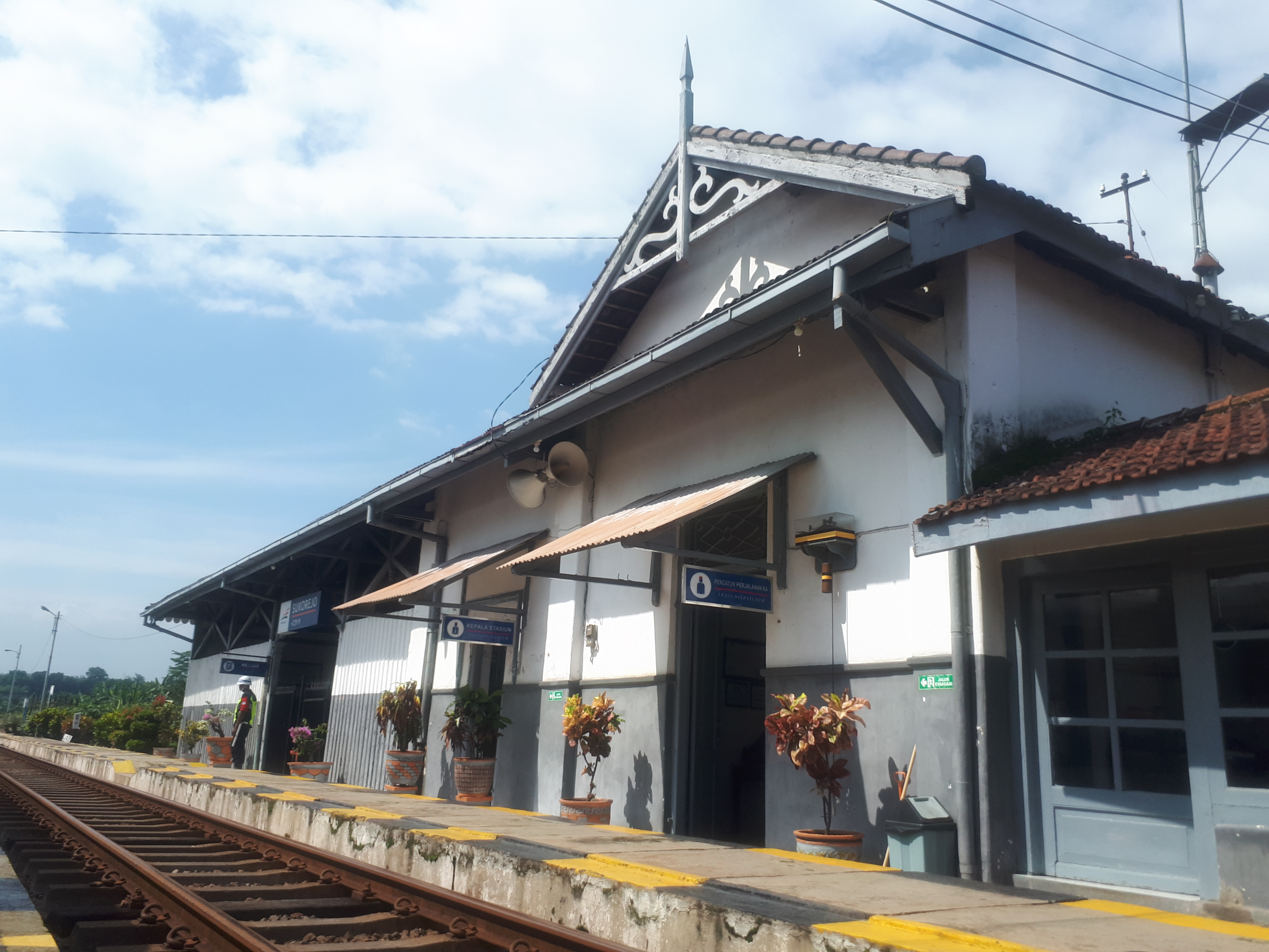 Stasiun Sukorejo pada tahun 2020